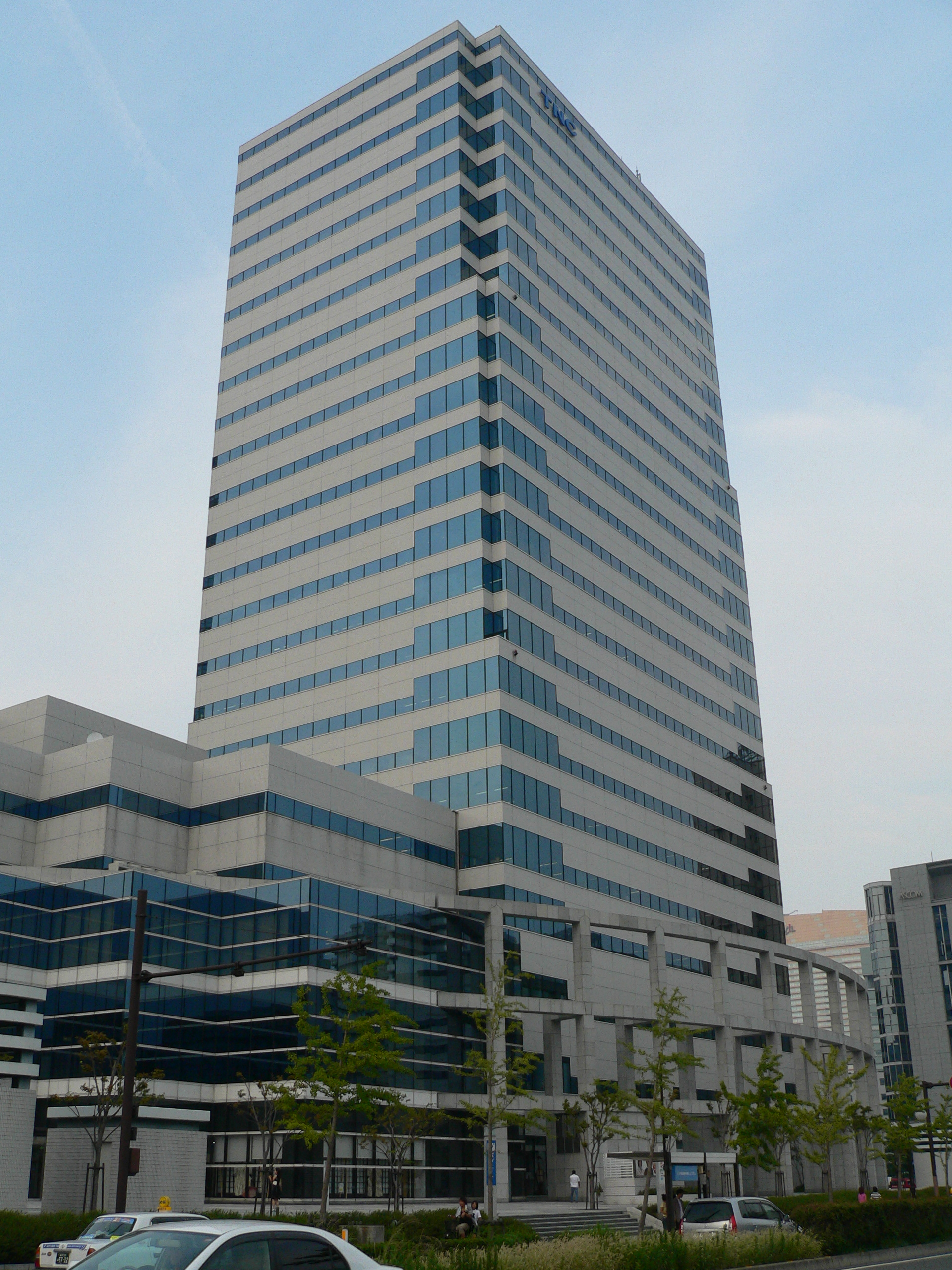 福岡県福岡市早良区百道浜のテレビ西日本本社ビル全景。